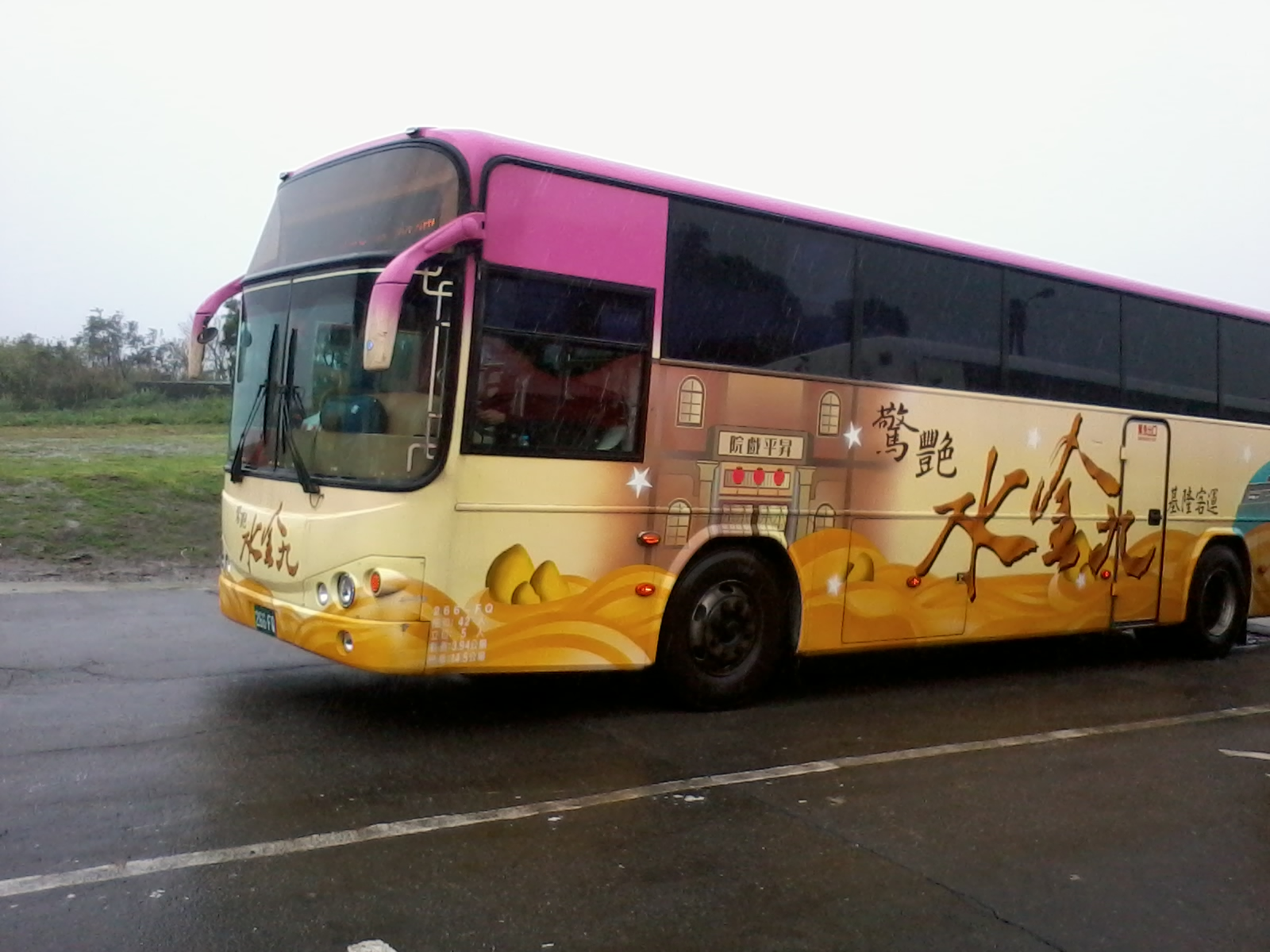 基隆客運日野RK8JRSA大客車「驚艷水金九」彩繪車266-FQ車頭。